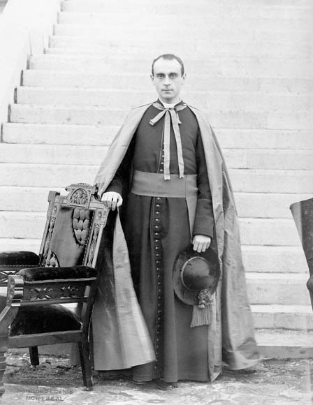 Son Excellence Monseigneur Merry Del Val